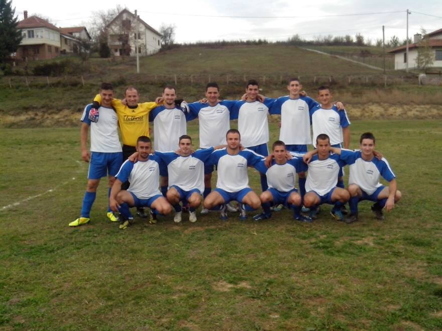 Srpski (latinica): fk buducnost blaznava